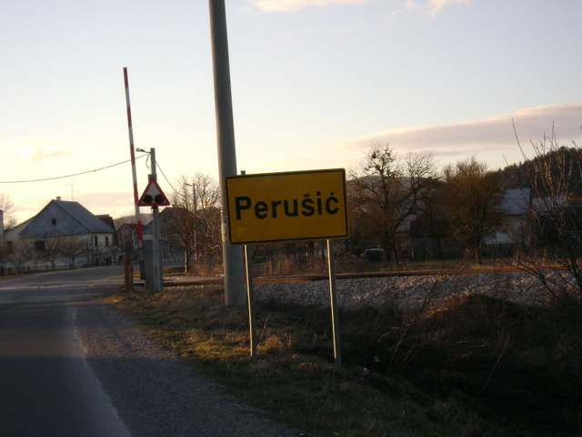 ŽCP u Perušiću na Ličkoj pruzi